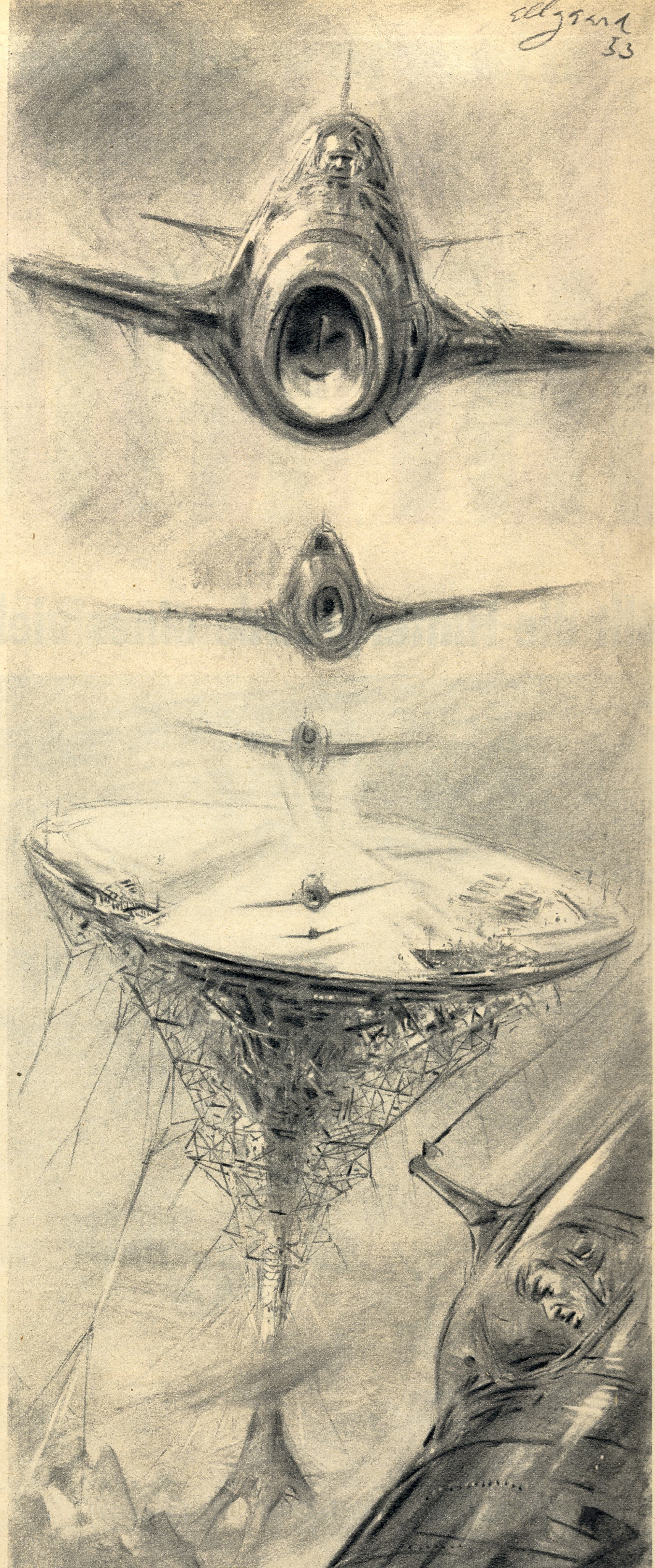 Science fiction: Start- und Landeplattform in der Stratosphäre, Zeitungsillustration von 1953